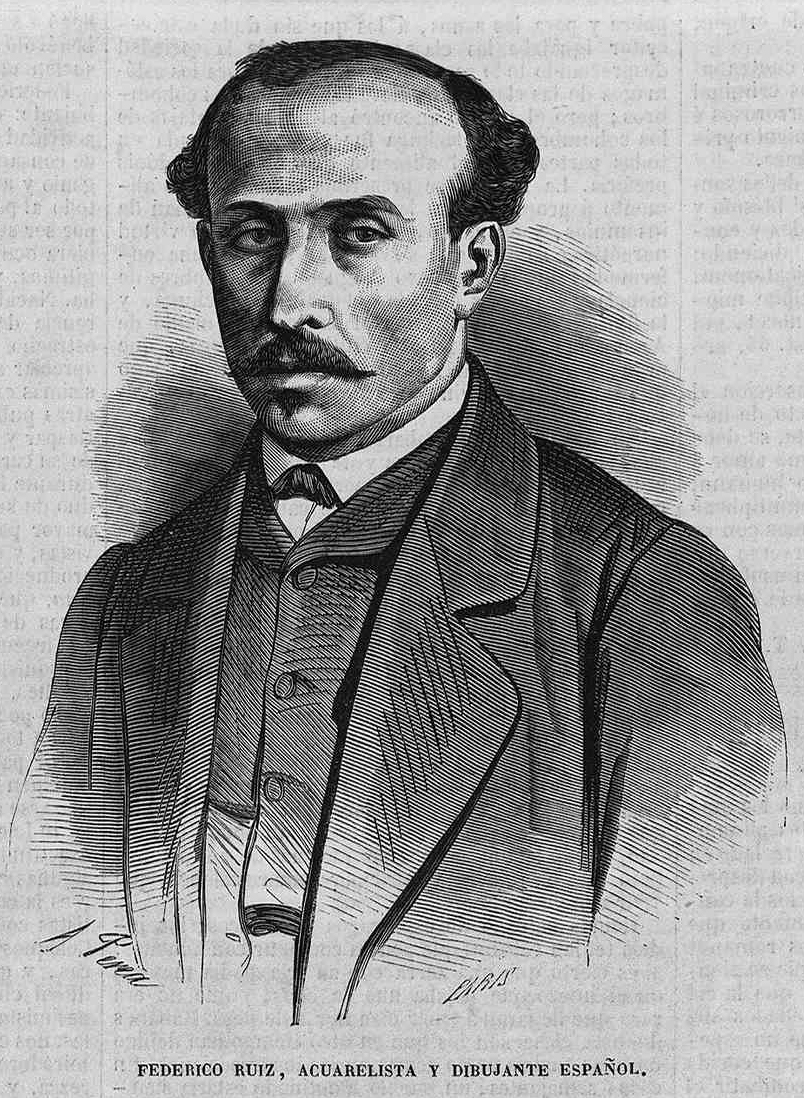 Federico Ruiz, acuarelista y dibujante español, en la revista española El Museo Universal.